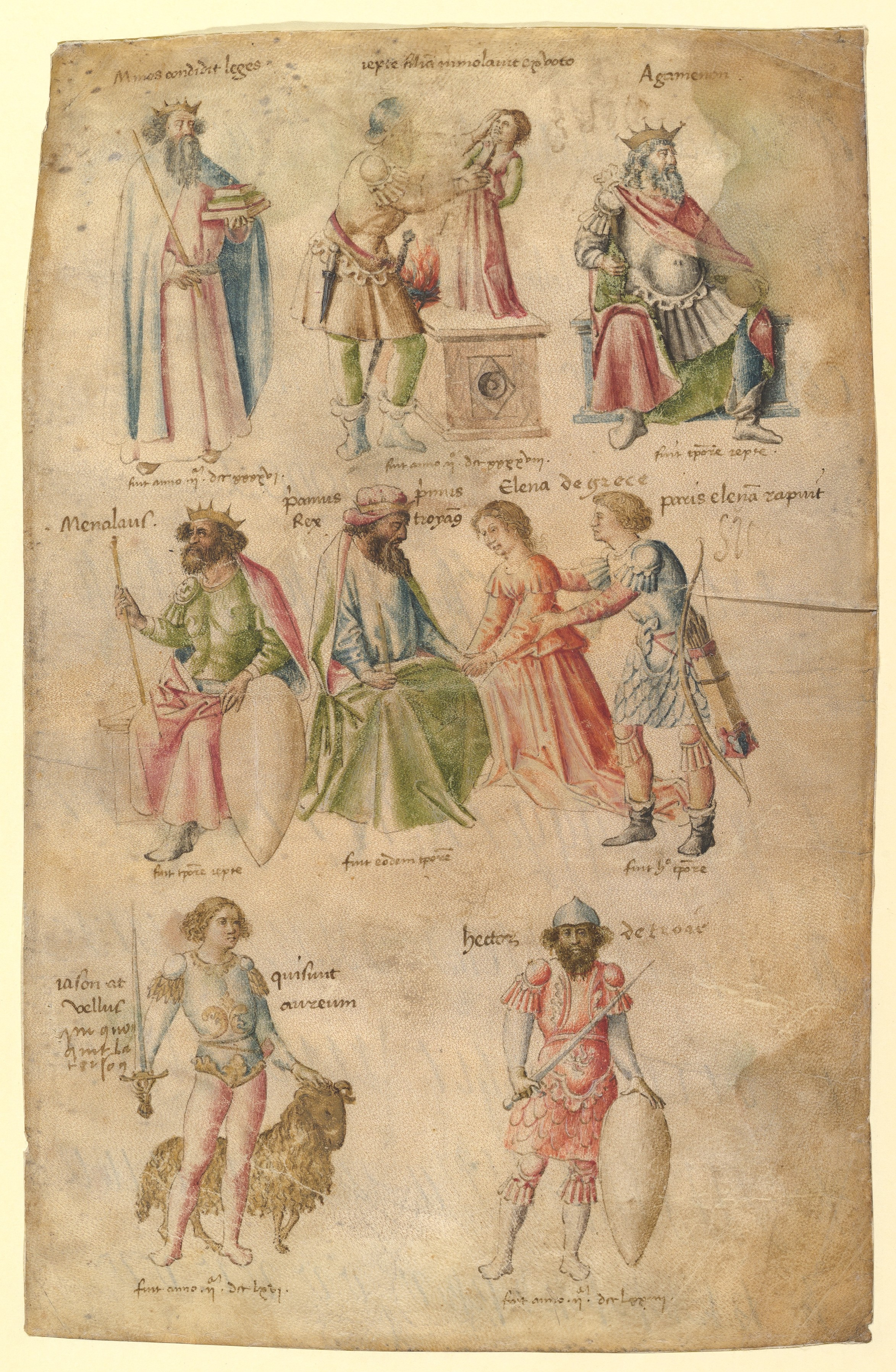 Représentation du roi Minos, le sacrifice de la fille de Jephté, Agamemnon, Ménélas, Paris présentant Hélène à Priam, Jason et la toison d'or, Hector.